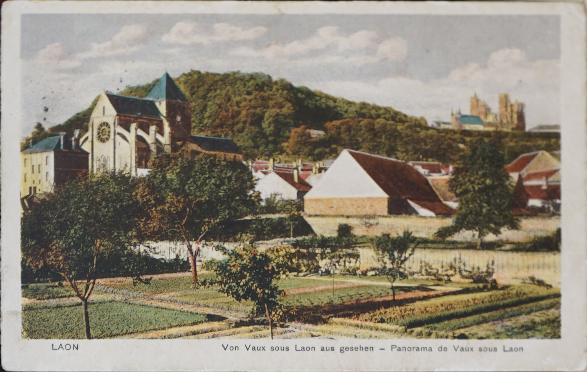 sur une carte postale du début du XXe siècle.